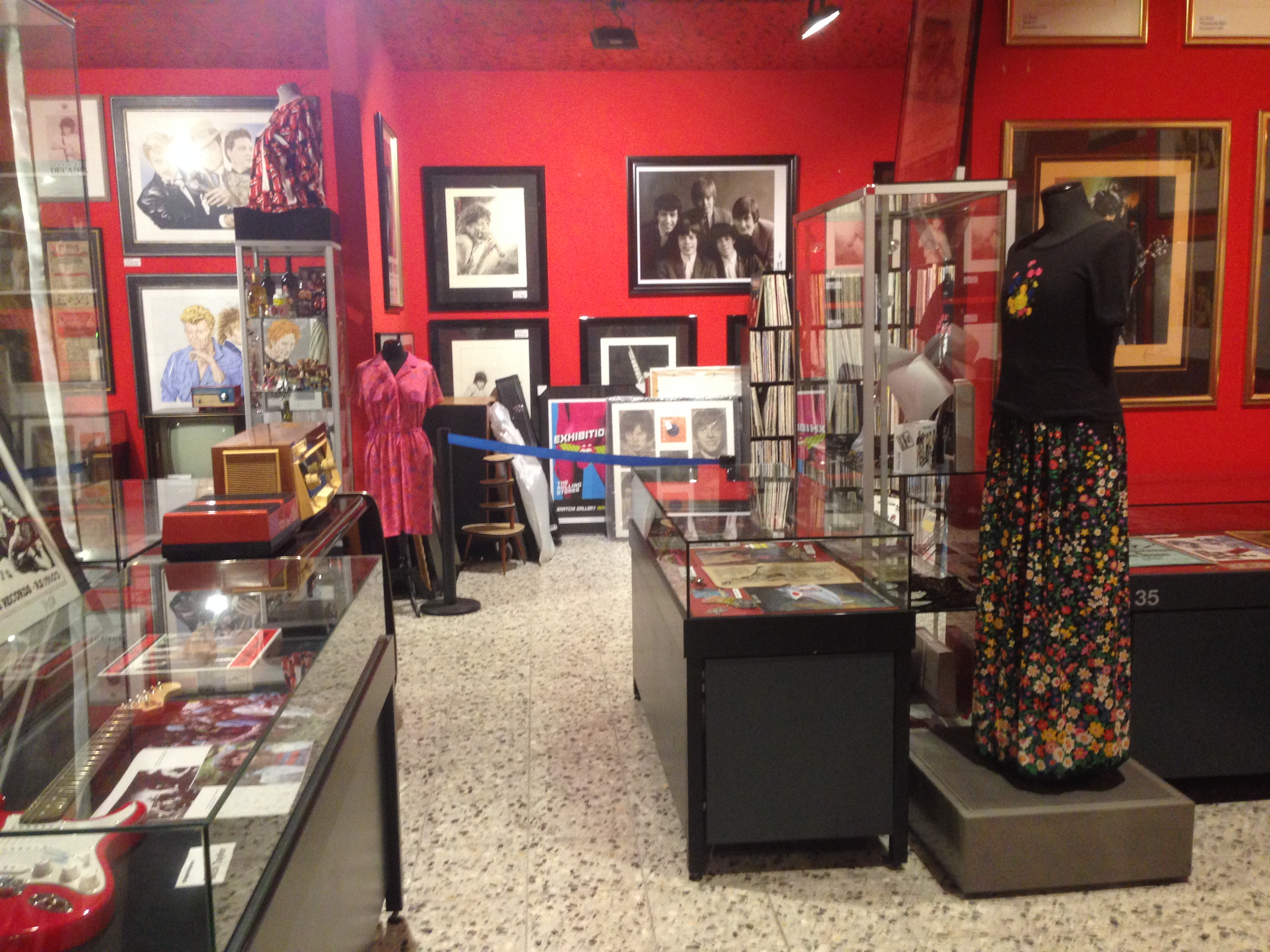 Stones Fan Museum, Lüchow, Germany